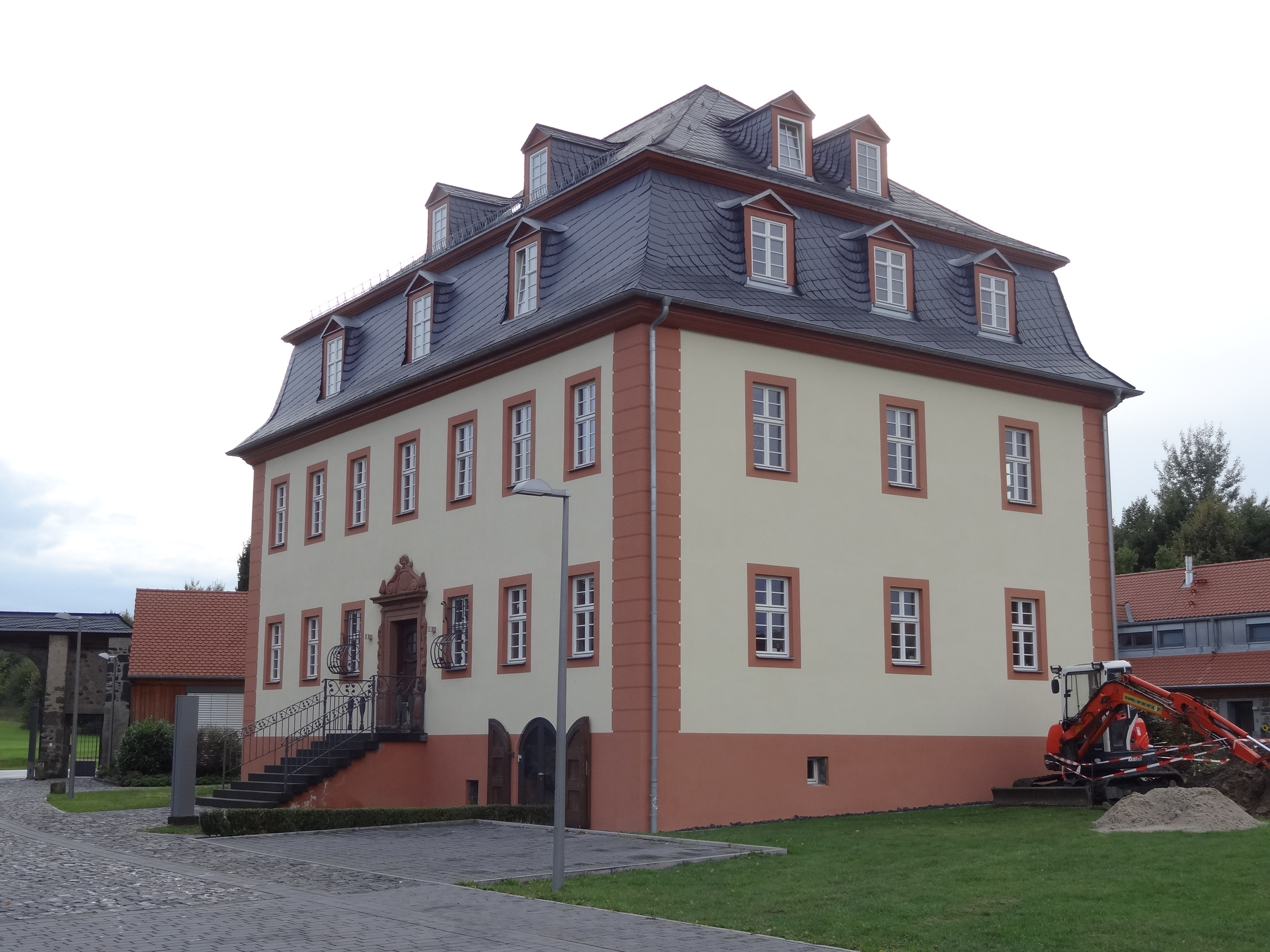 Hofgut Kolnhausen